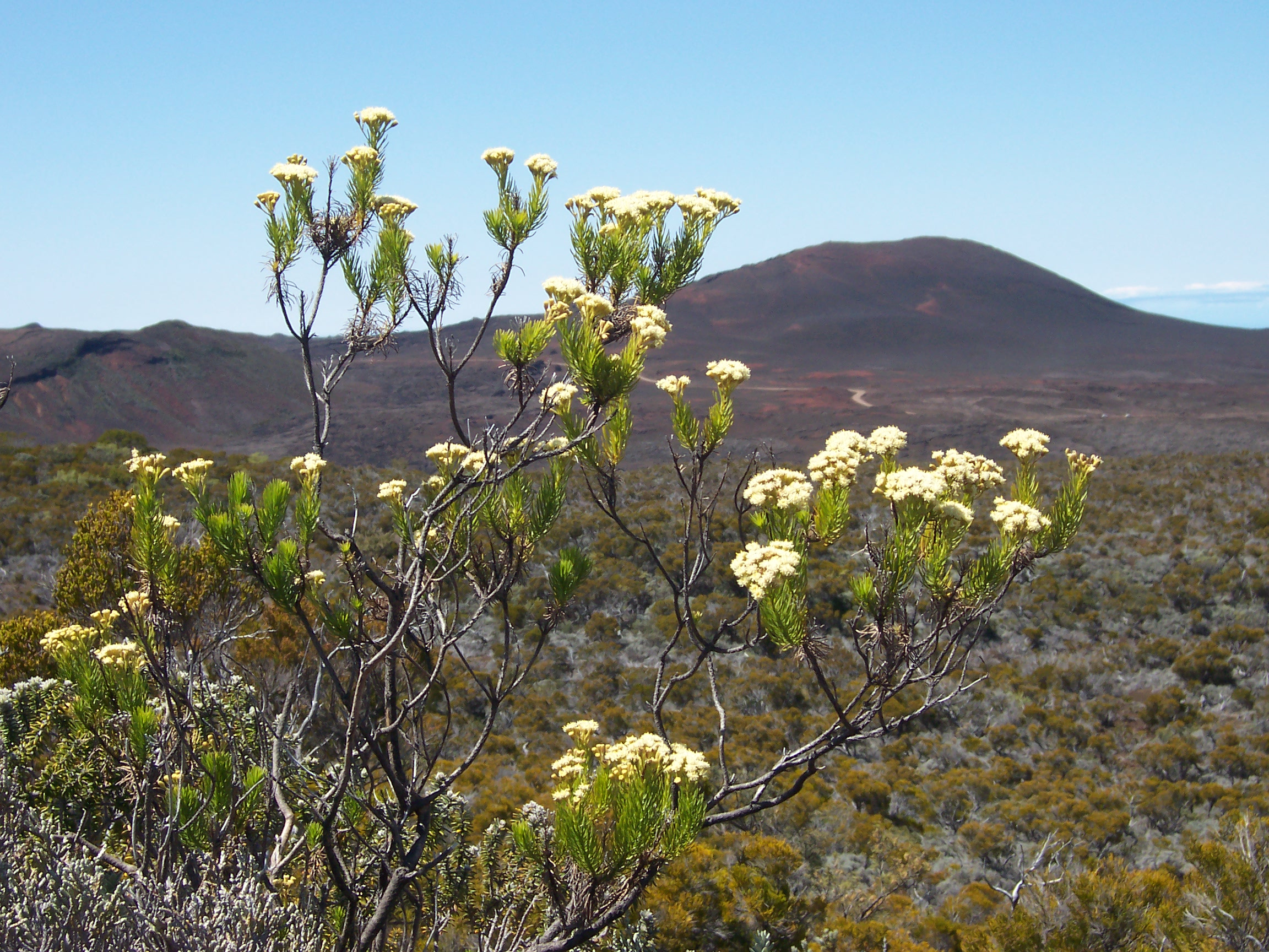 Faujasia pinifolia (Asteraceae), an endemic species to Réunion island, on plateau des Basaltes place